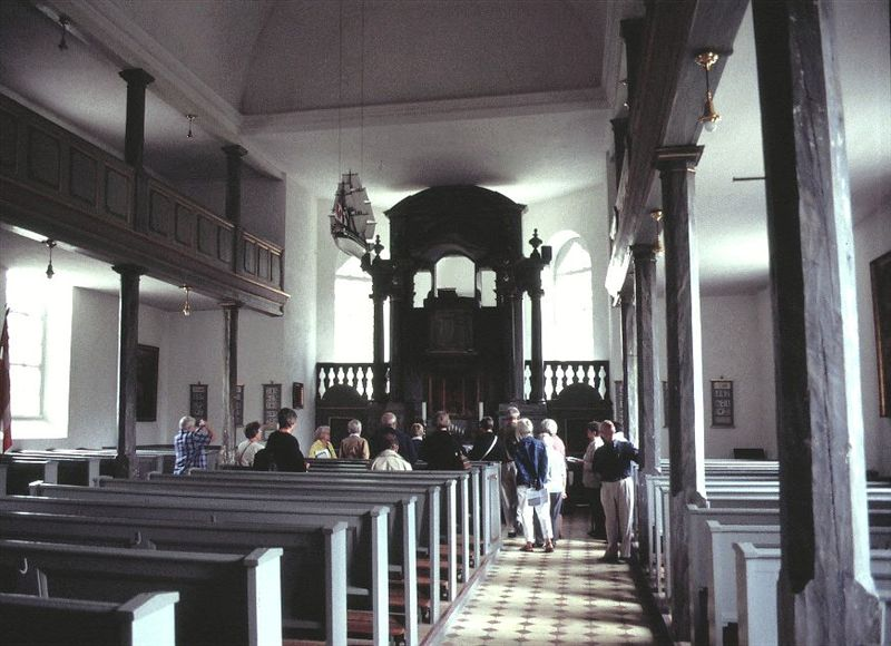 Damsholte Kirke Møn Kommune, Denmark; Kirkerummet set mod øst